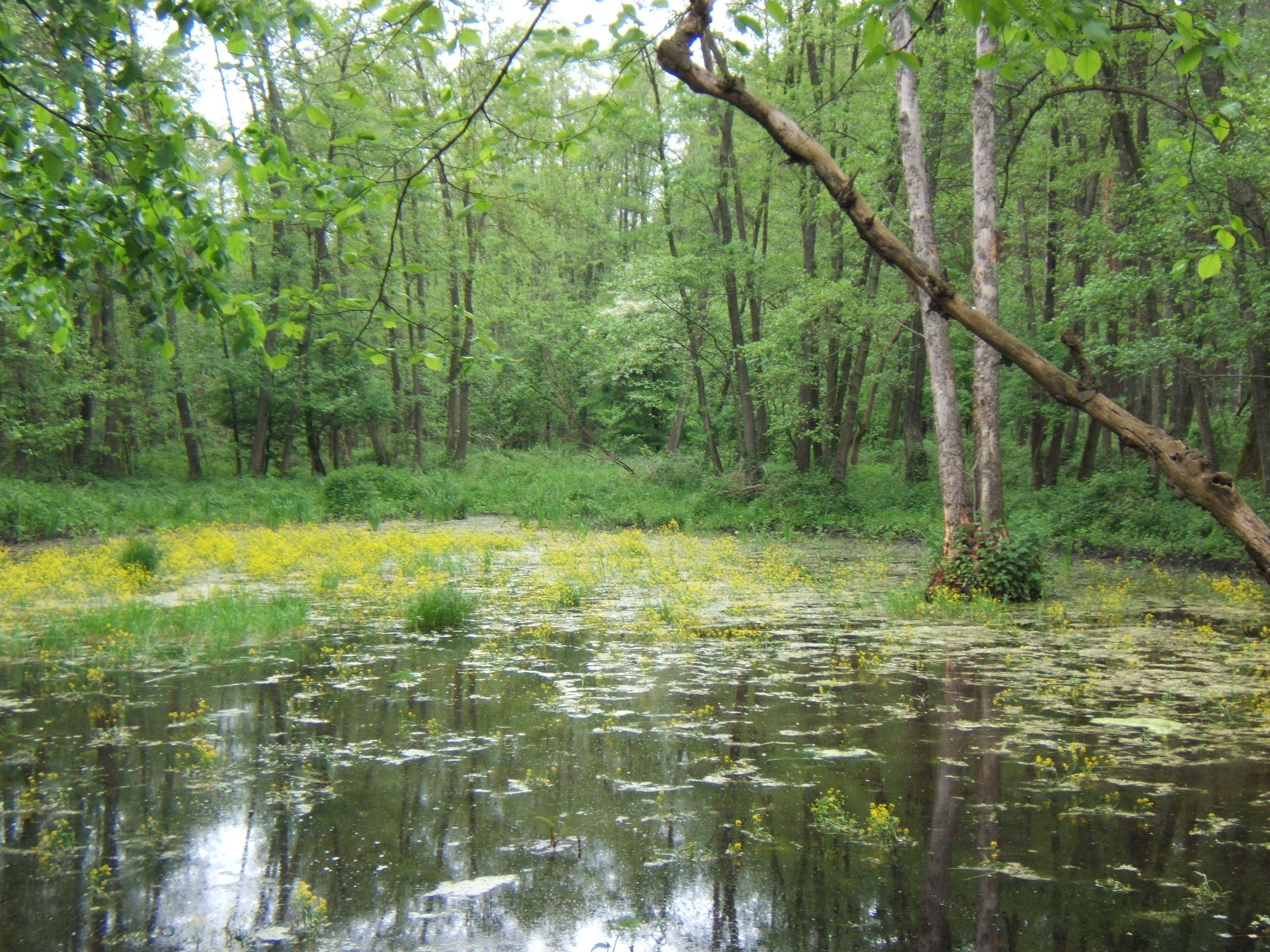 Hosszúvíz, mocsár Cserfekvés közelében